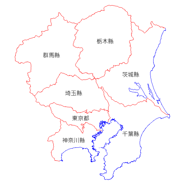 日本關東地方行政區圖